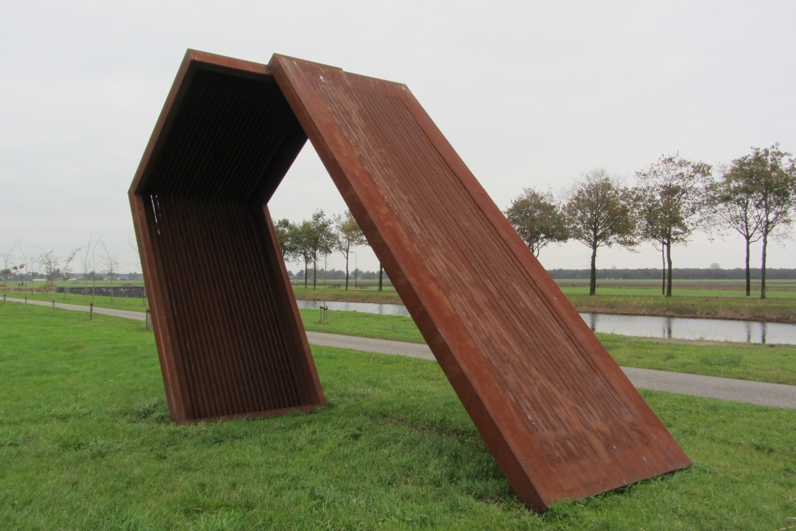 Ids Willemsma,2014. Dit monument stond bij Museum Belvédère in Heerenveen. Sinds 2018 staat het in Leeuwarden